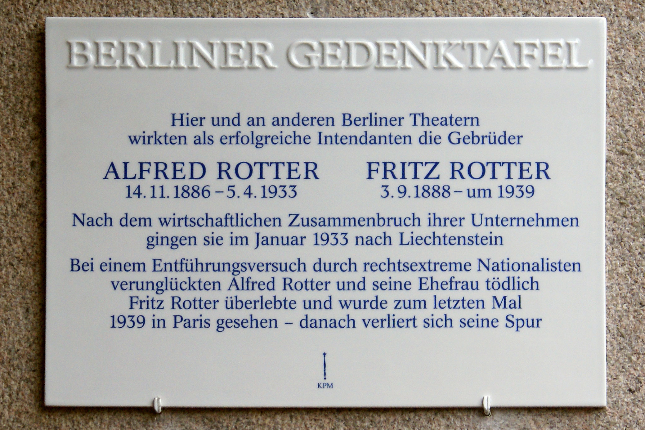 Berliner Gedenktafel am Admiralspalast für die Gebrüder Alfred und Fritz Rotter, denen dieses Theater einst gehörte.